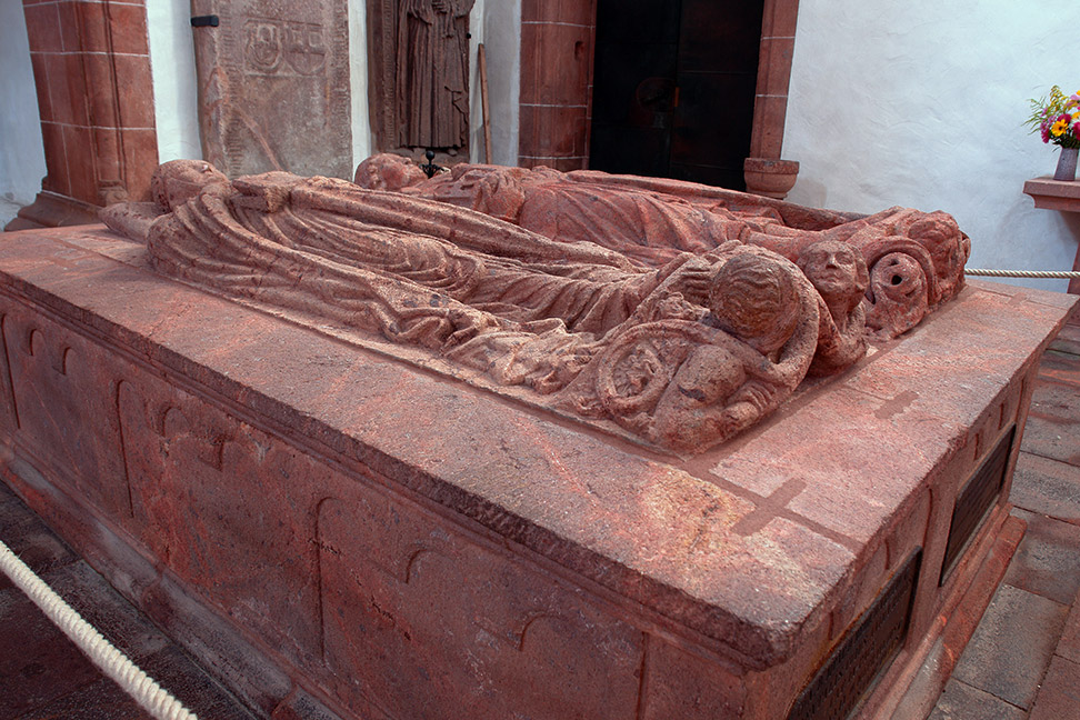 Grab von Dedo V. der Feiste (rechts im Bild) neben seiner Frau Mechthilde von Heinsberg